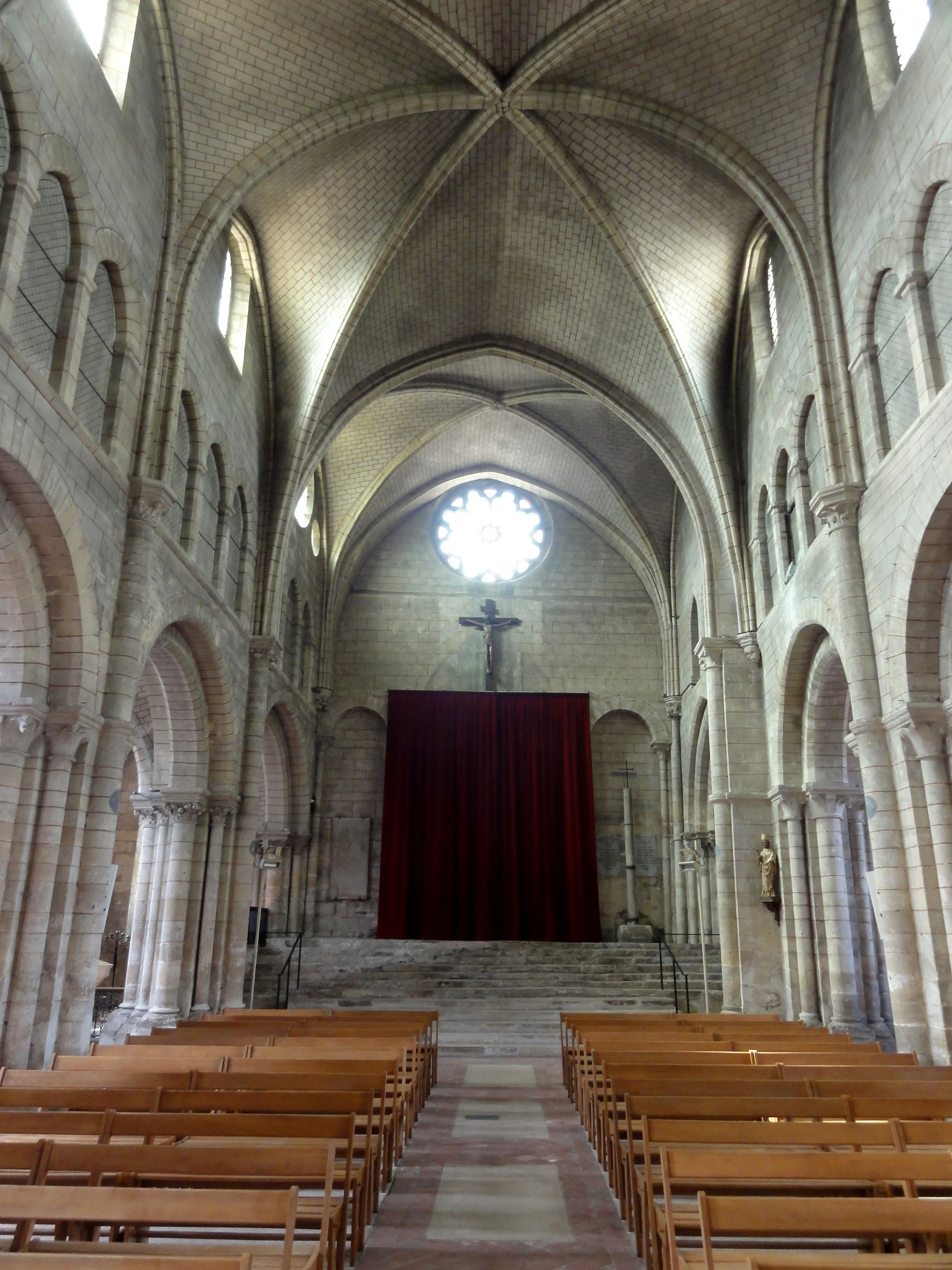 Nef, vue vers l'ouest.